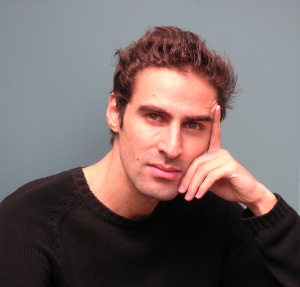 Photo de l'écrivain Hafid Aggoune